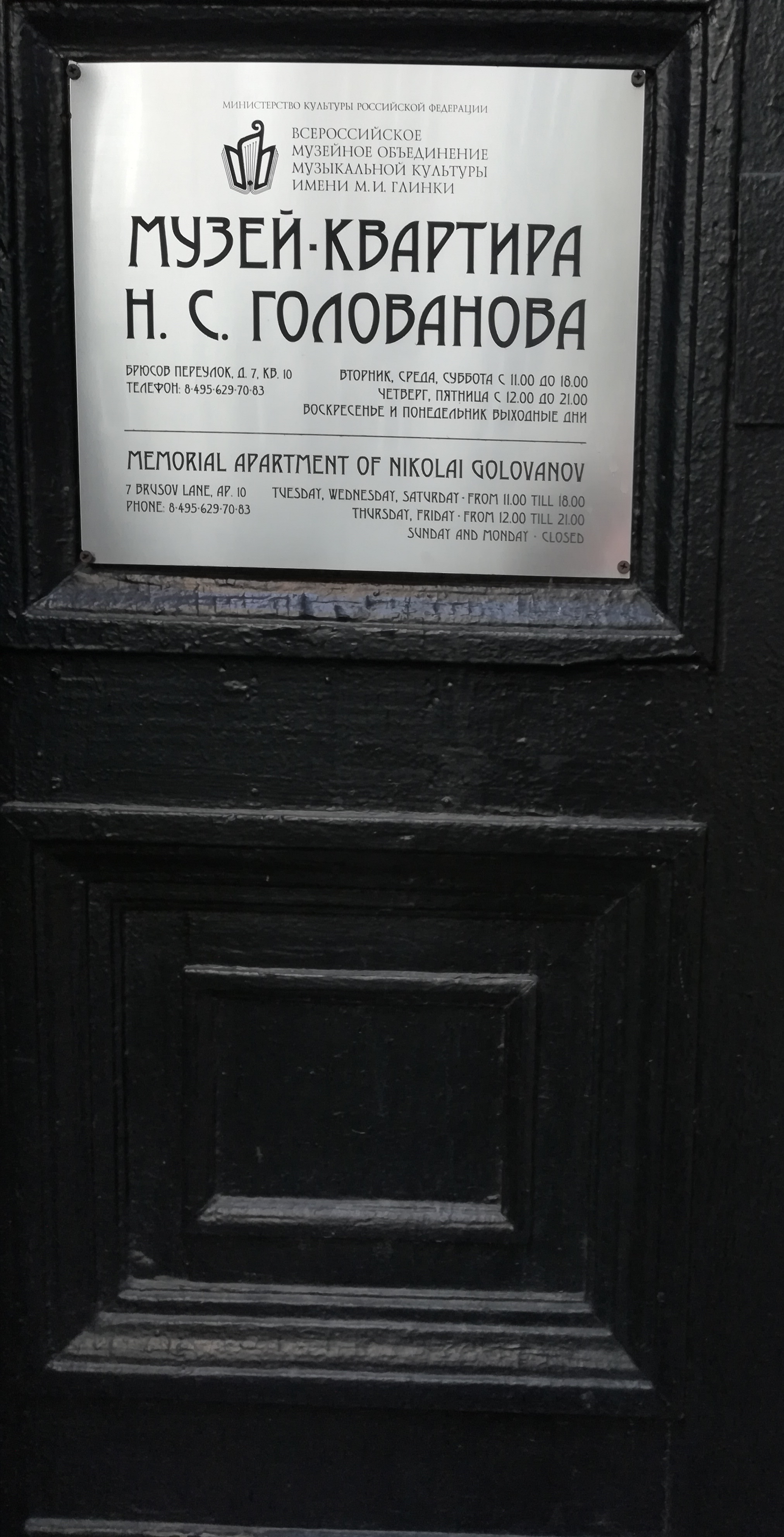 Вход в музей